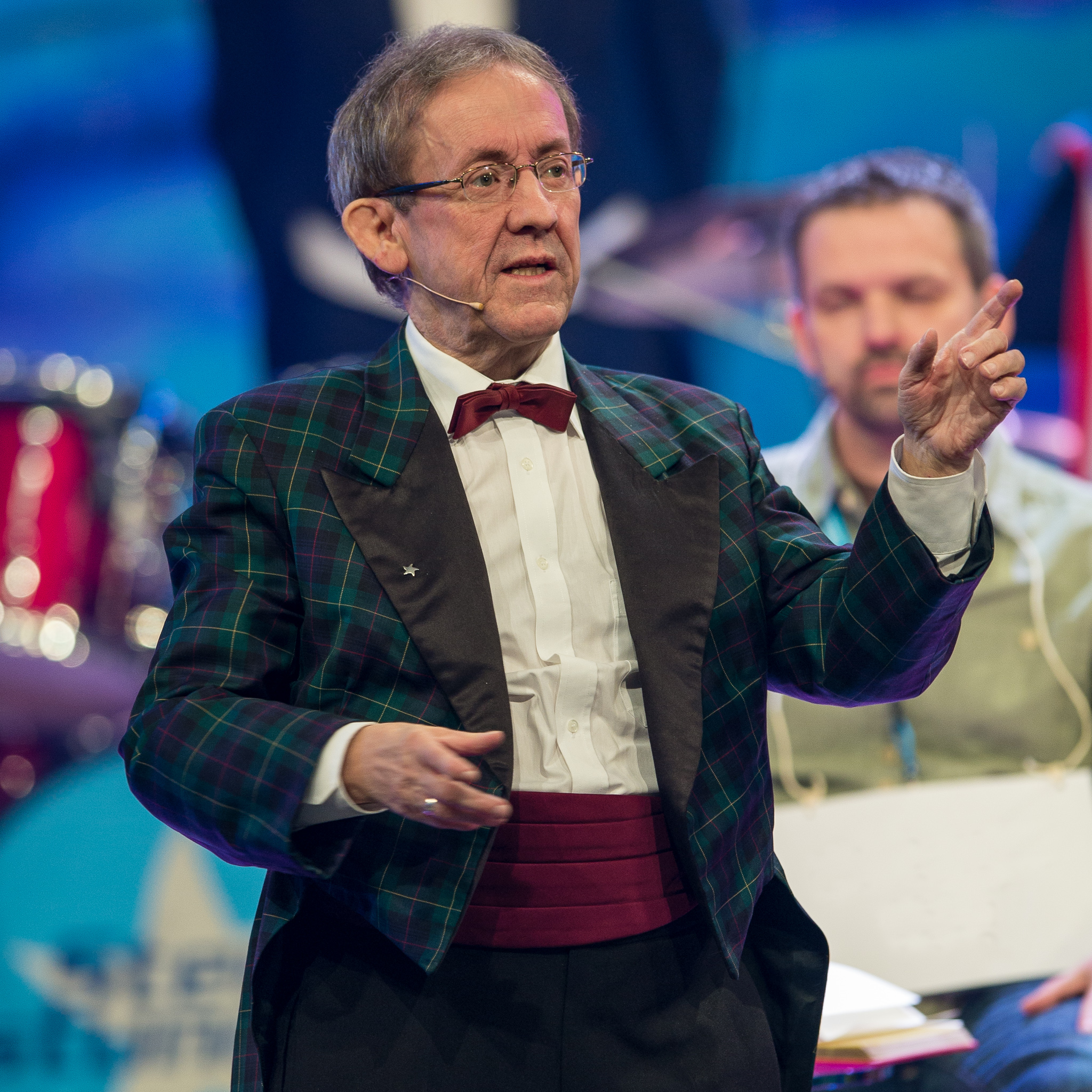 BR,Bayerisches Fernsehen,Bob Ross,Frankenhalle,Live-Sendung,Sternstunden-Gala,Sternstundengala